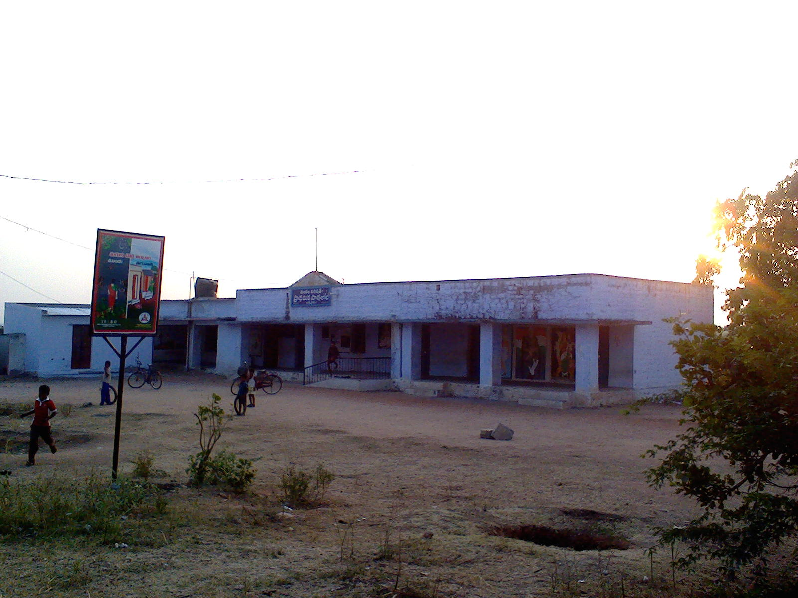 ప్రాథమిక పాఠశాల, బసాపురం